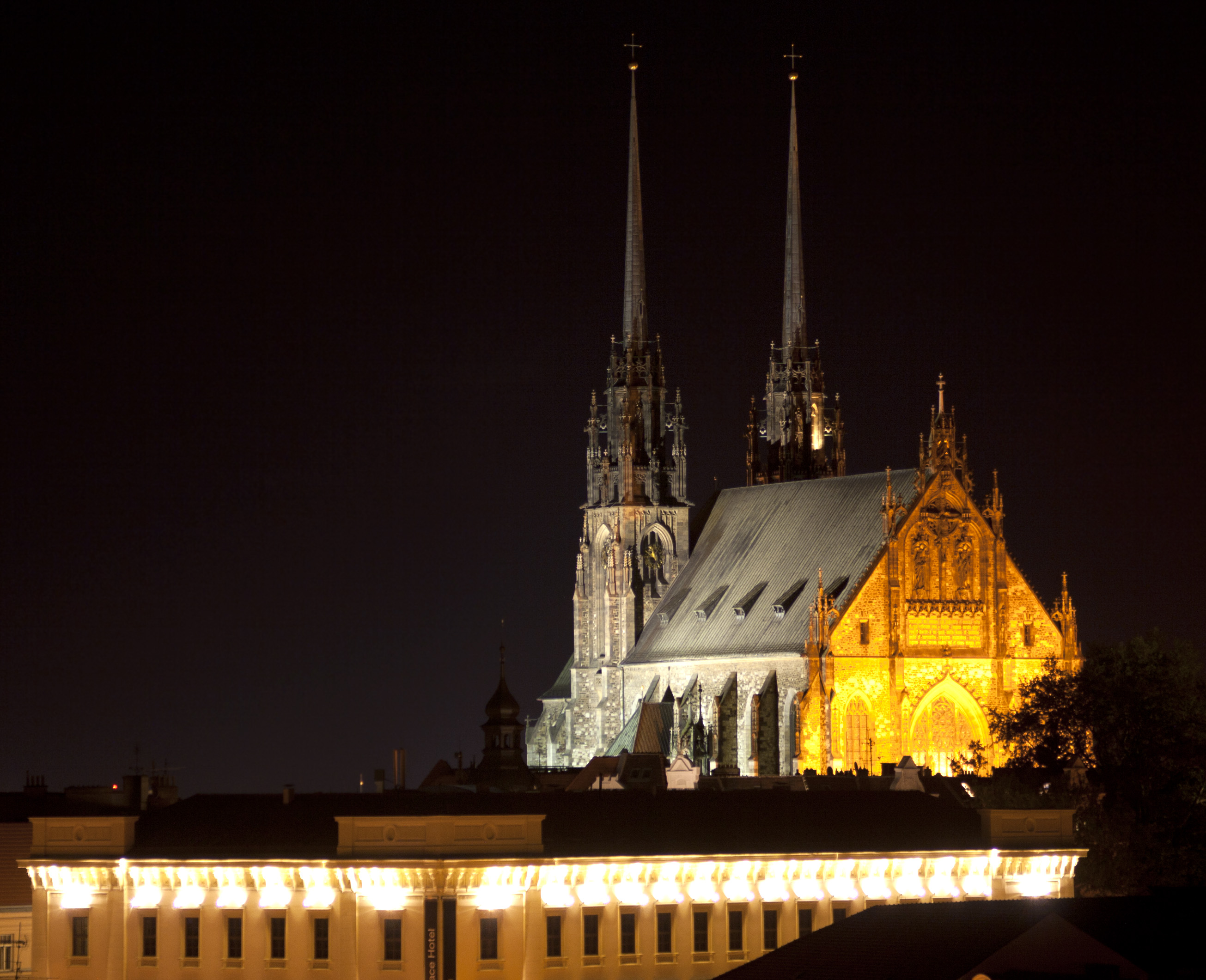 Katedrála svatého Petra a Pavla, Brno 11.5.2012.